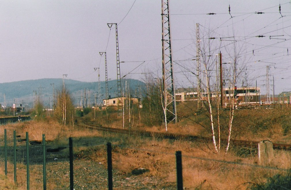 Das Gleis der ehemaligen KBS 263g/627 Ehrang-Igel bei Ehrang. Der Teil zwischen Trier-Ehrang und Trier-Biewer wurde nach der Einstellung des Personenverkehrs 1983 stillgelegt und die Weichen in Ehrang und Biewer wurden entfernt. Seitdem mündet die Trierer Weststrecke direkt in den Güterbahnhof Ehrang. Im Hintergrund die Moseltrecke und der Güterbahnhof Ehrang mit dem Stellwerk Ehrang.